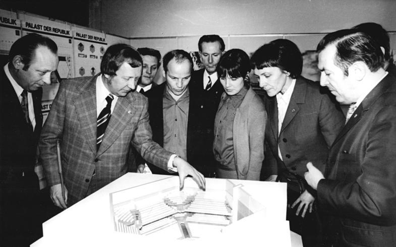 Berlin, Modell "Palast der Republik", Graffunder ADN-ZB Spremberg 9.2.74 Berlin: SED-Bezirksdelegiertenkonferenz Während einer Beratungspause besichtigten Delegierte der Bezirksdelegiertenkonferenz Berlin das Modell des Palastes der Republik. Heinz Graffunder (2.v.l.), Chefarchitekt des Palastes, erläuterte ihnen die Inneneinrichtung. Abgebildete Personen: Graffunder, Heinz: Architekt, DDR